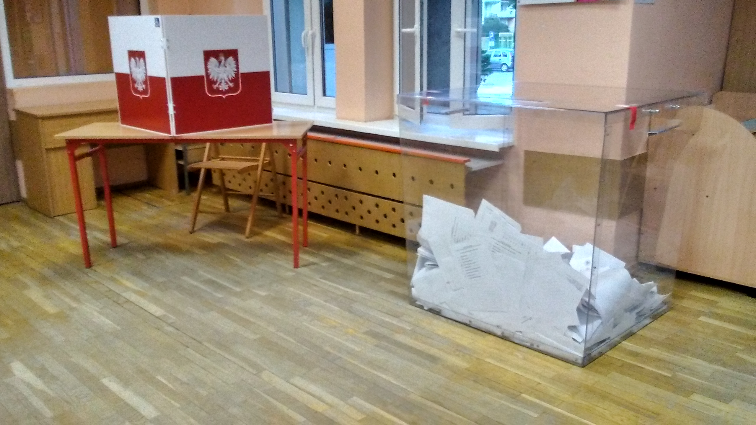 2020 Presidential election in Poland, ballot box in Tomaszów Mazowiecki, ul. Sikorskiego 6A